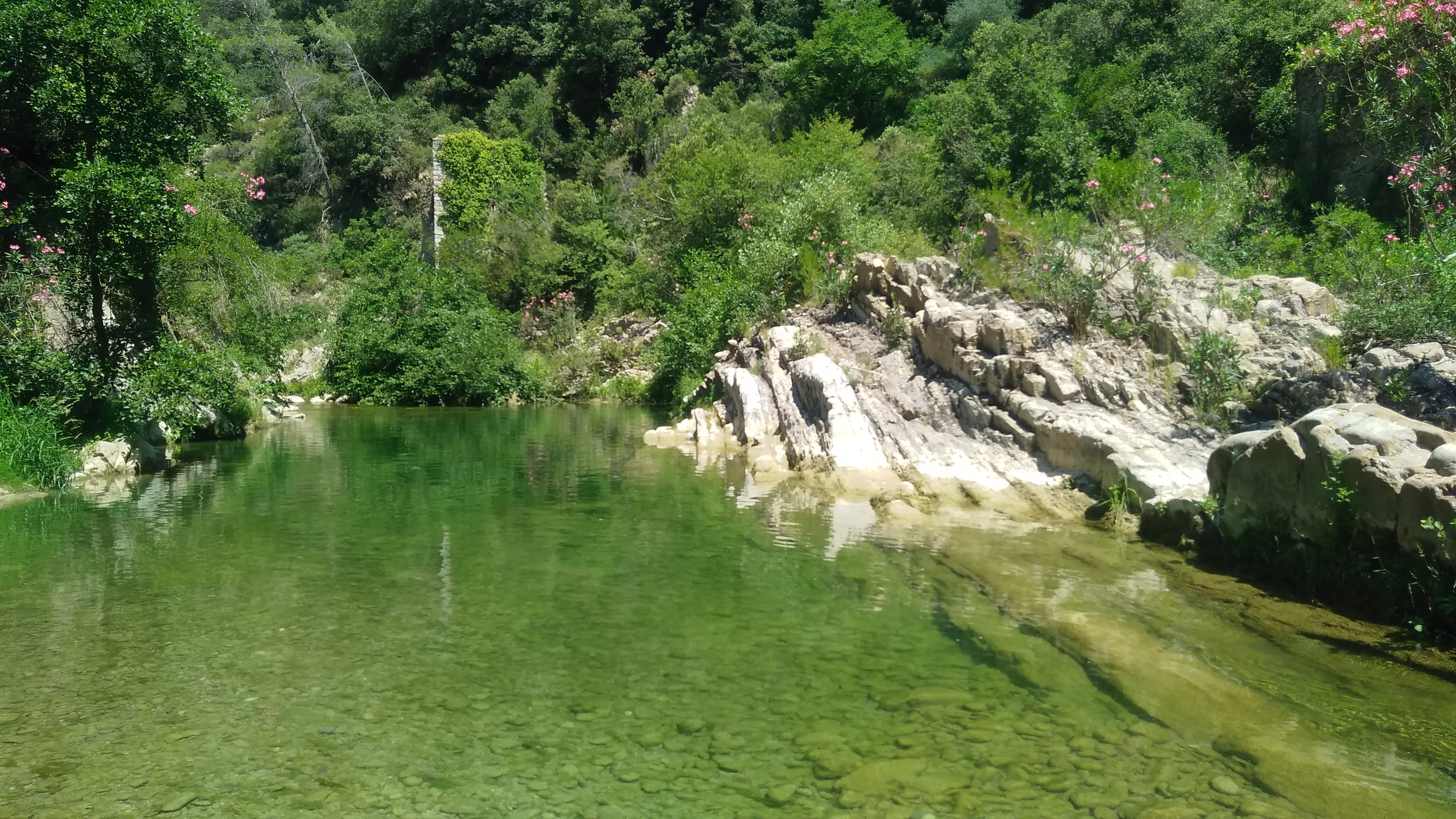 Monte Grammondo - Torrente Bevera (Q47502132)